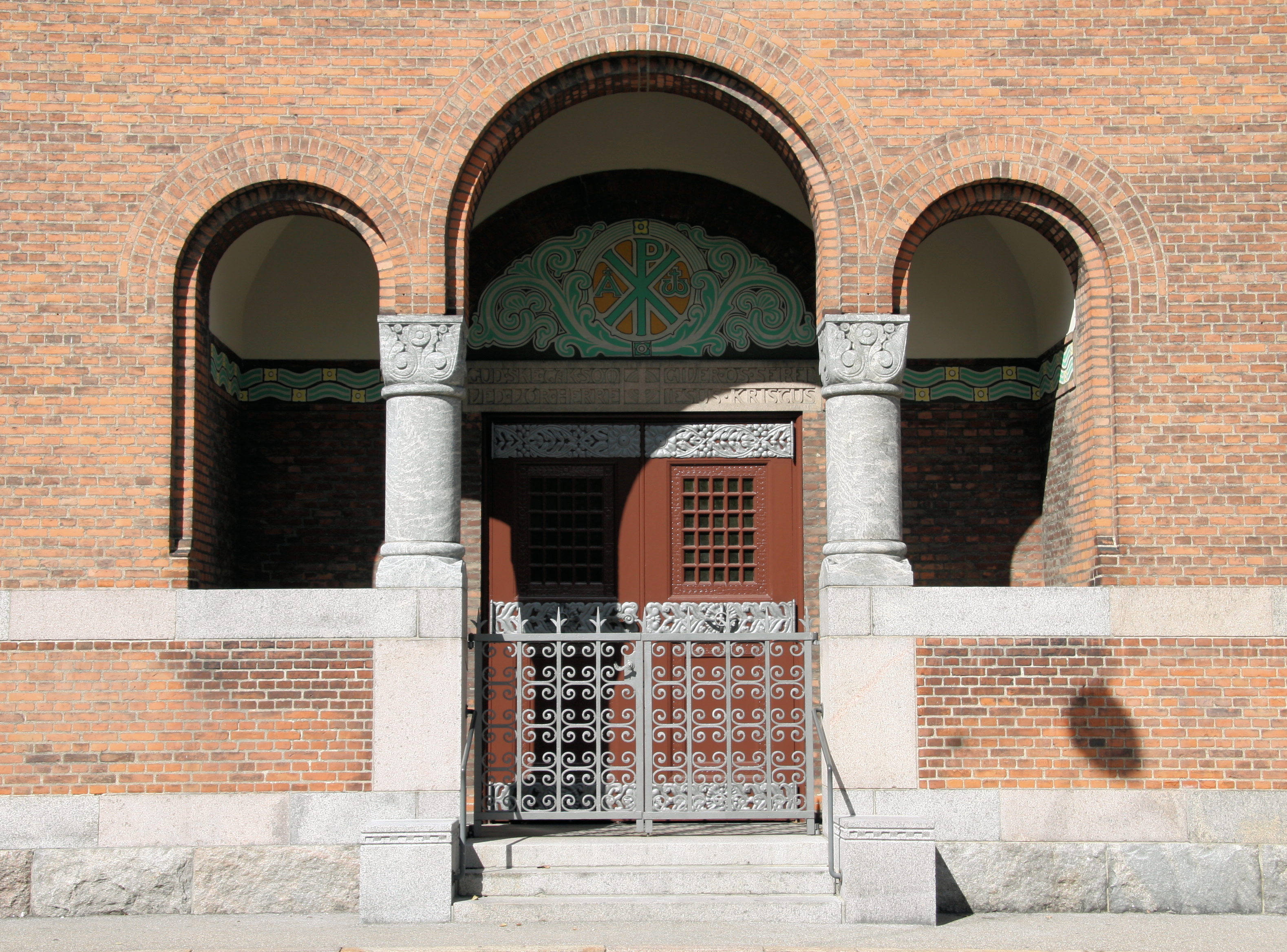 Mariendals Kirke in Copenhagen, Denmark.